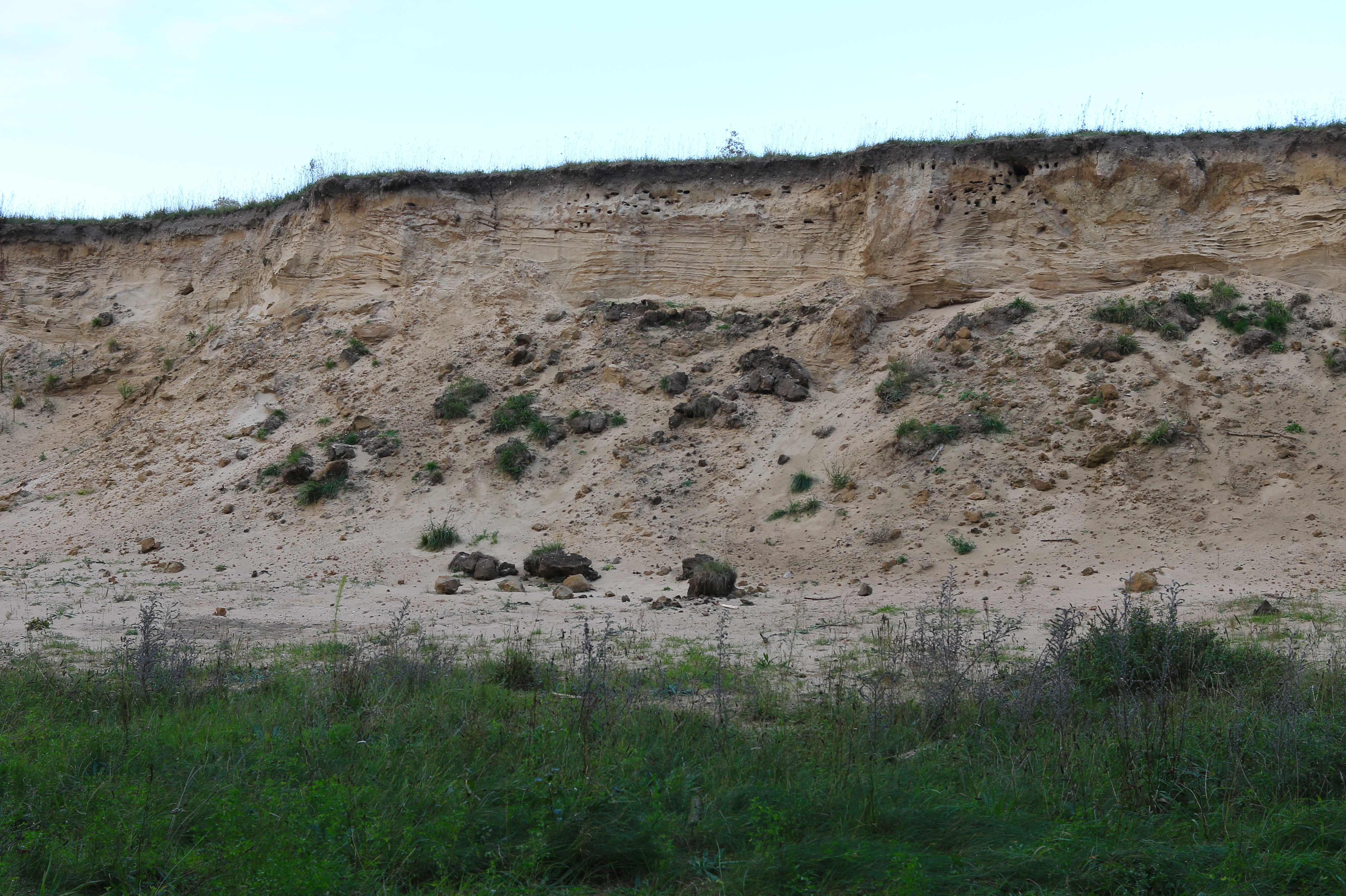 Maglarps sandtag